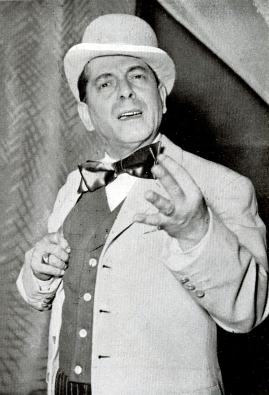 photo from magazine Archivio personale (1952)